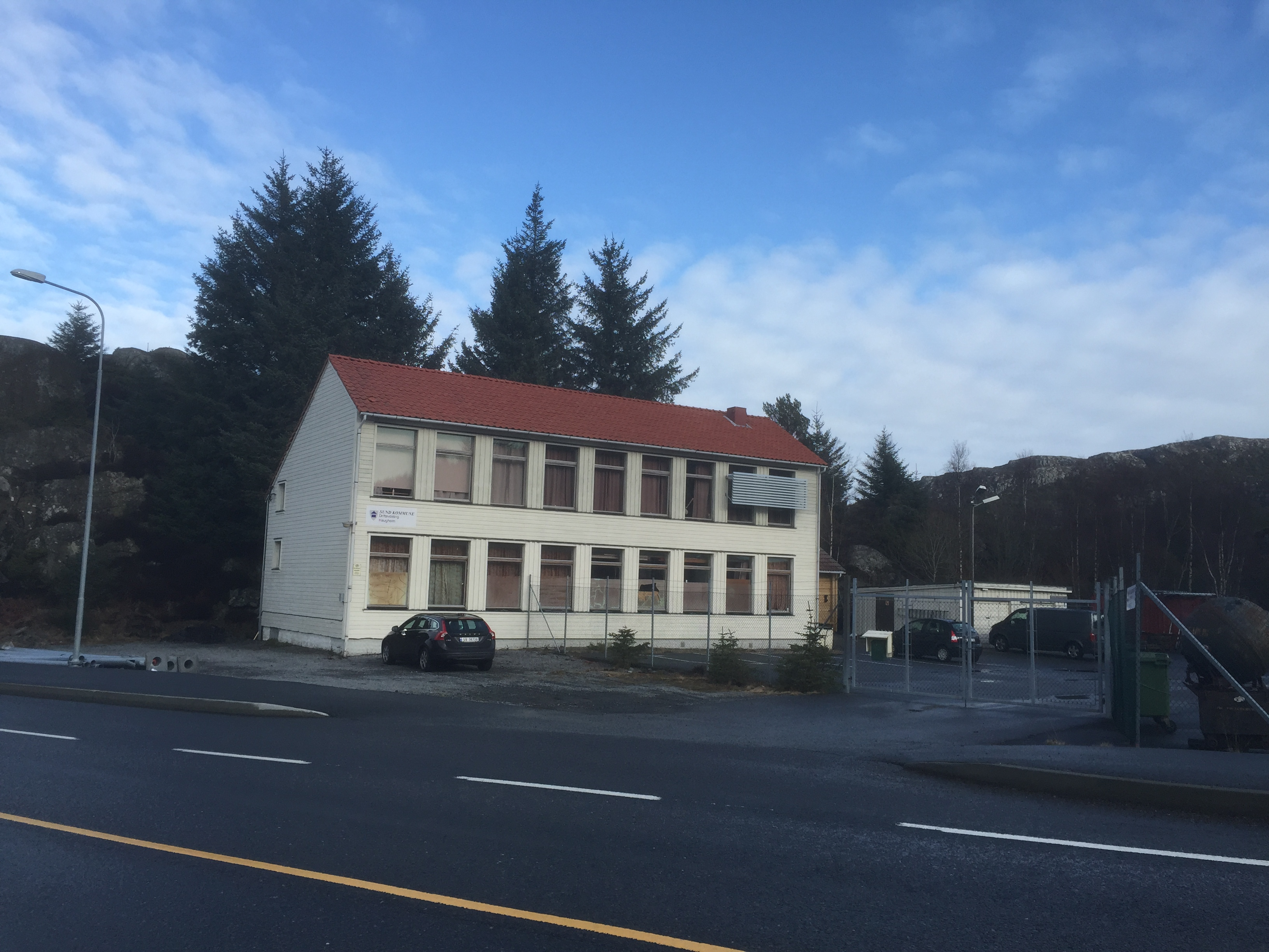 Haugeheim skule, skole i Sund kommune